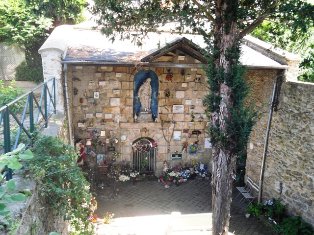 Sainte-Geneviève-des-Bois (Essonne, Île-de-France, France) : La grotte miraculeuse de Sainte-Geneviève.